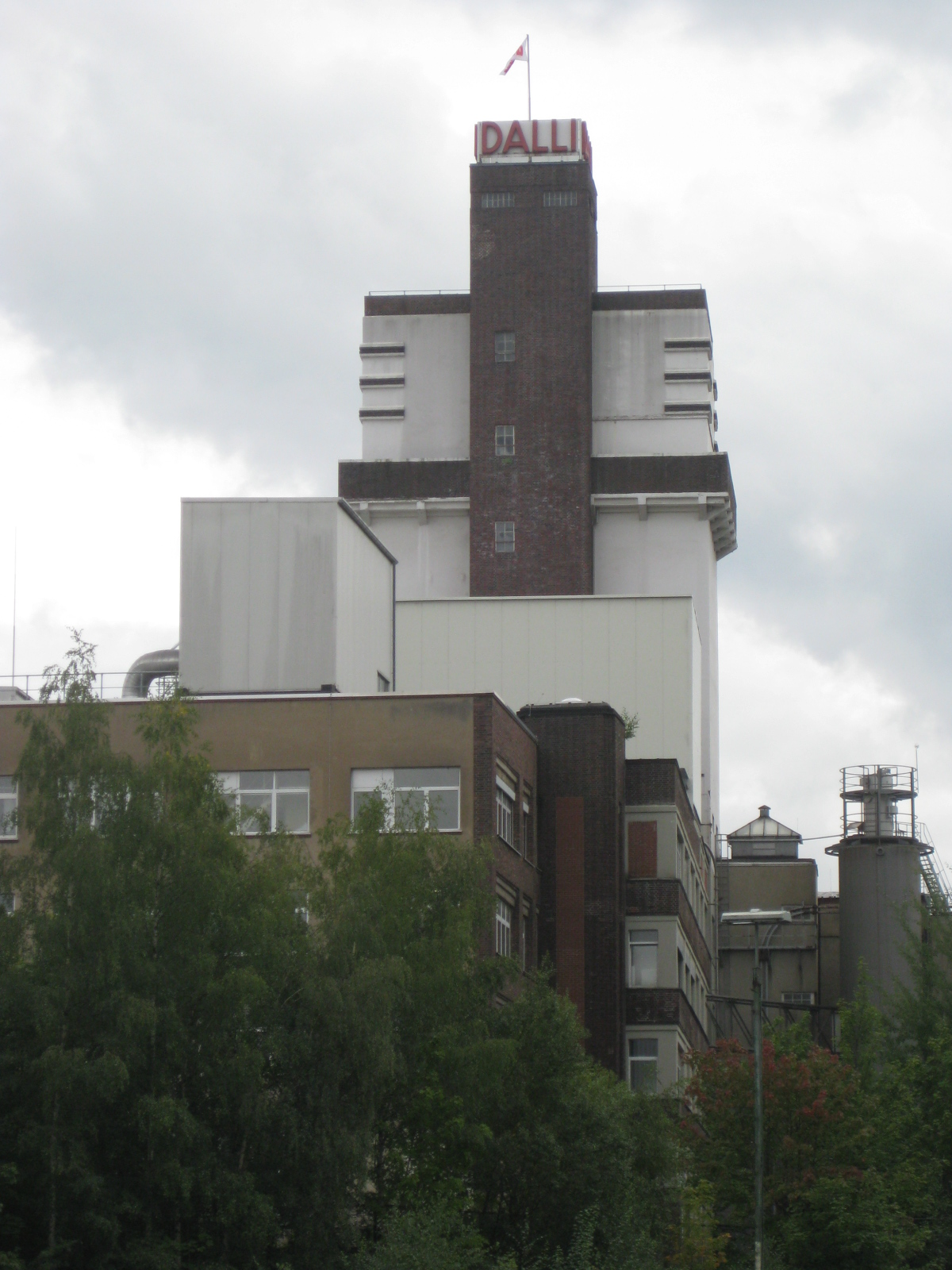 Dalli-Werke im rheinischen Stolberg